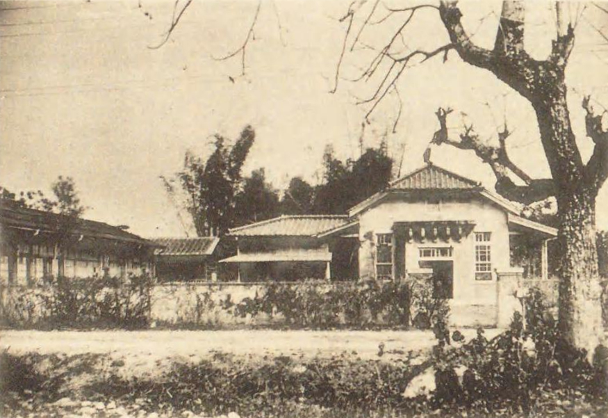 日治時期屏東的傳染病醫院